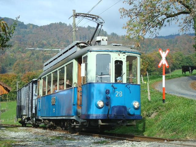 Strassenbahn Motorwagen Ce 2/3 28 der Tramways Lausannois (TL), im Oktober 2008 anlässlich einer Sonderveranstaltung zum Jubiläum 40 Jahre Museumsbahn Blonay-Chamby in Cornaux. Die Haltestelle wurde dazu kurzzeitig in En Marin (Schatten in den Fenstern) umbenannt und dementsprechend beschriftet.